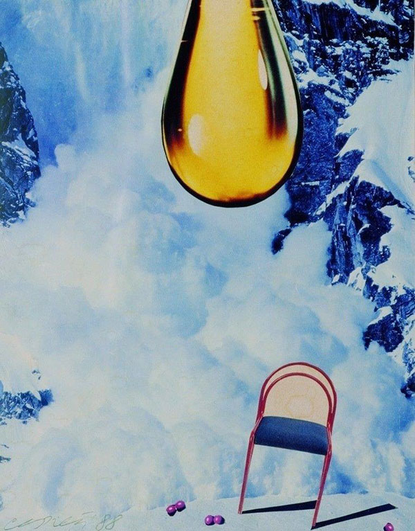 Снег, 1988